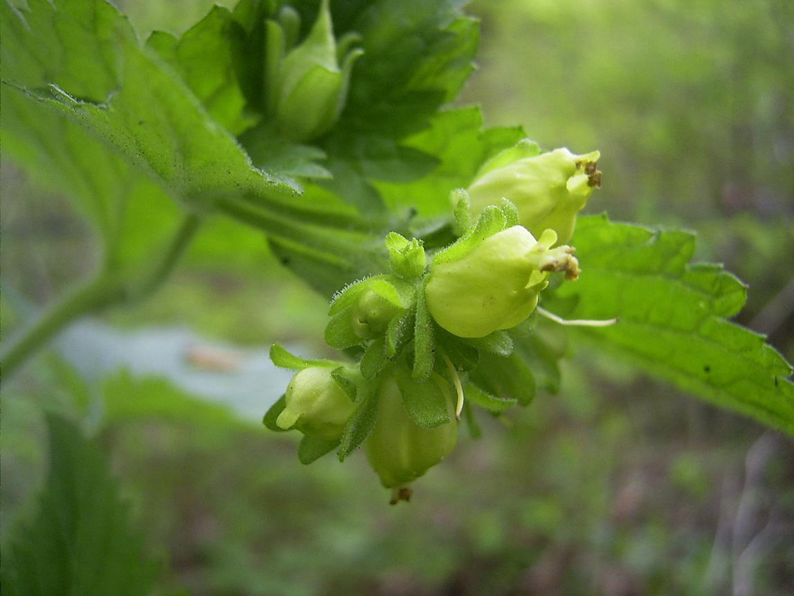 Scheveningse duinen, 24 april 2004